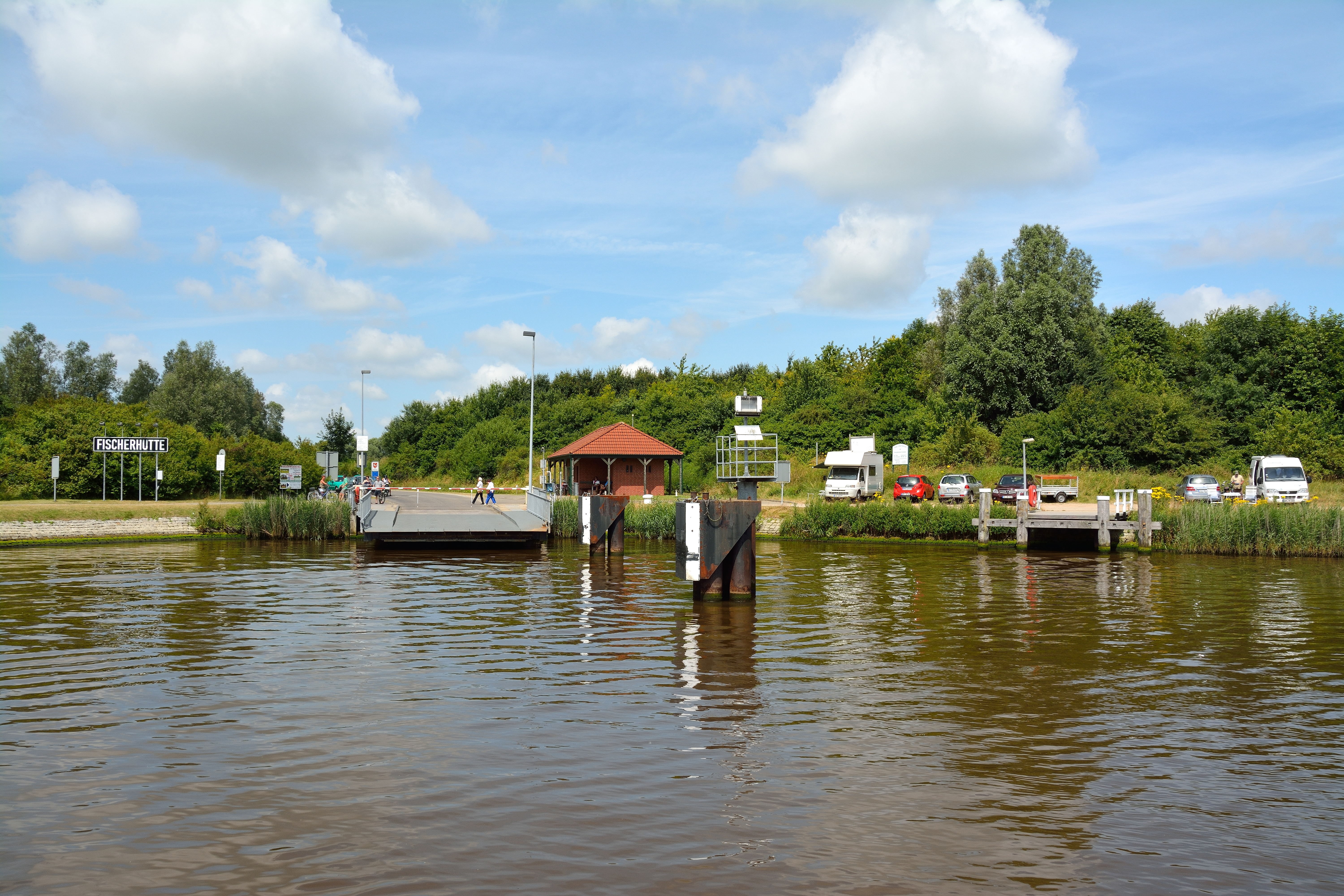 Anleger der Kanalfähre in Fischerhütte.